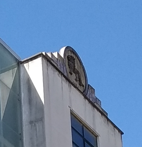 Lehen, AYA eraikina, orain udal zerbitzu askoren egoitza, bereziki kulturakoak